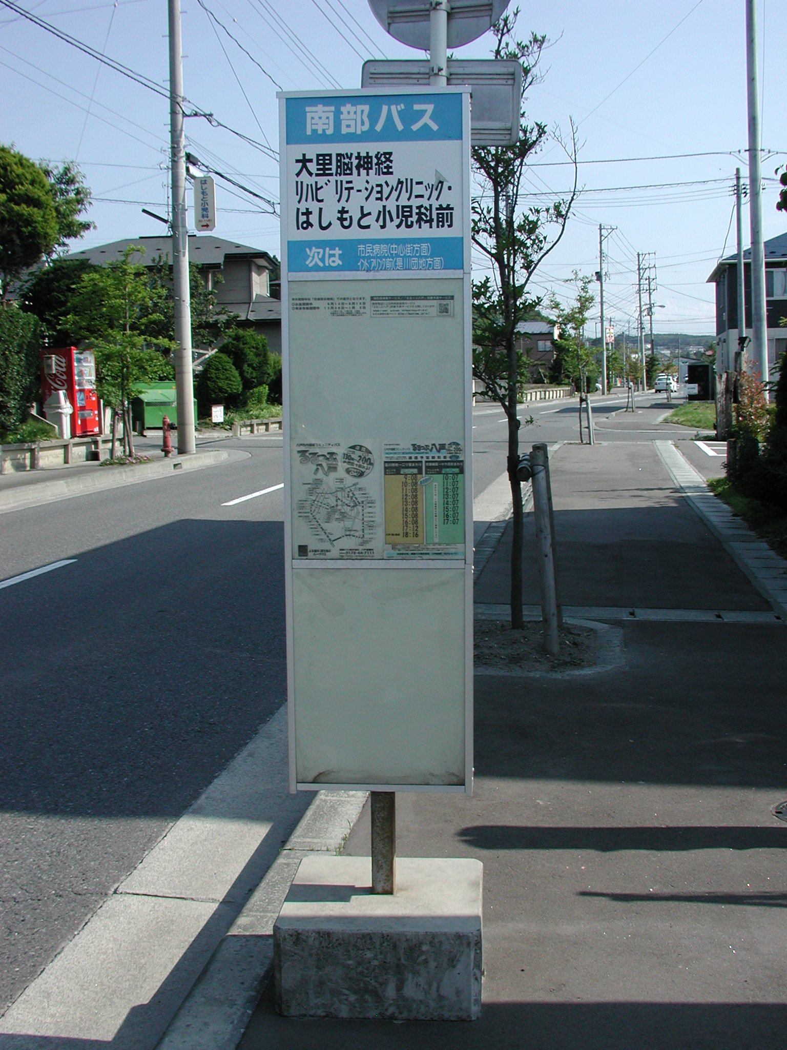 南部バス 通常型バス停留所ポール 「大里脳神経リハビリテーションクリニック・はしもと小児科前」バス停留所（るるっぷ八戸専用停留所：青森県八戸市新井田）